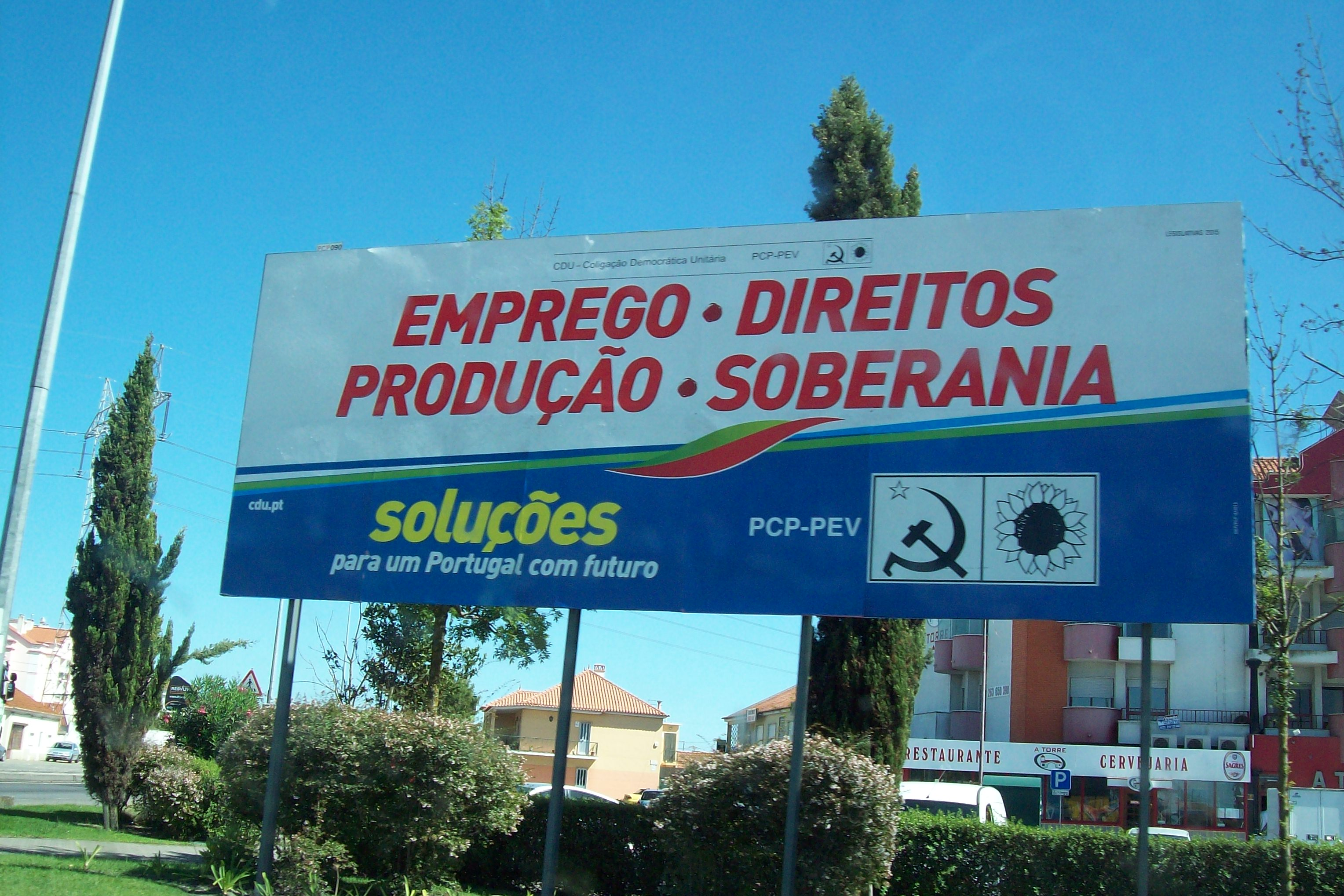 Cartaz da campanha eleitoral da CDU - Legislativas 2015